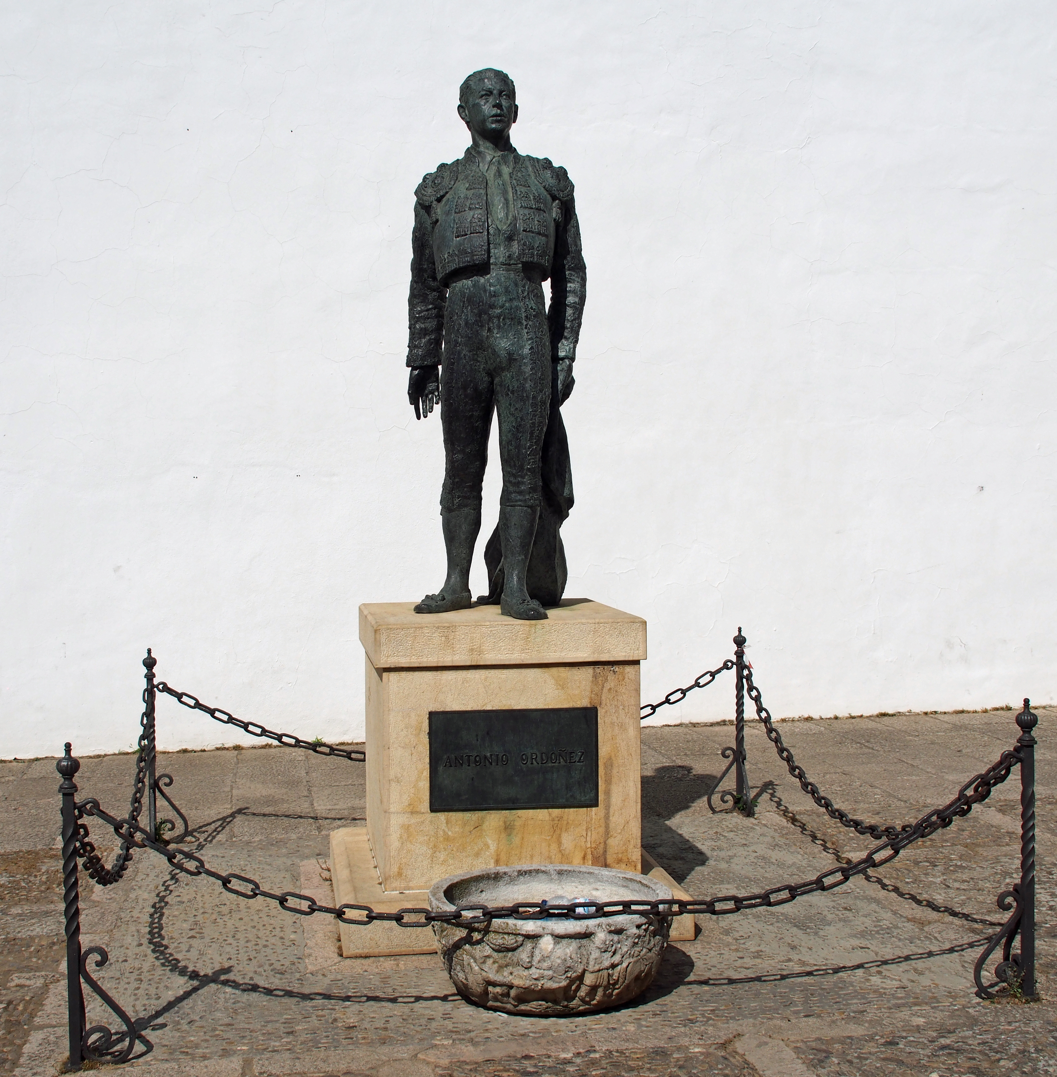 Statue des Toreros Antonio Ordóñez an der Stierkampfarena in Ronda (Andalusien)